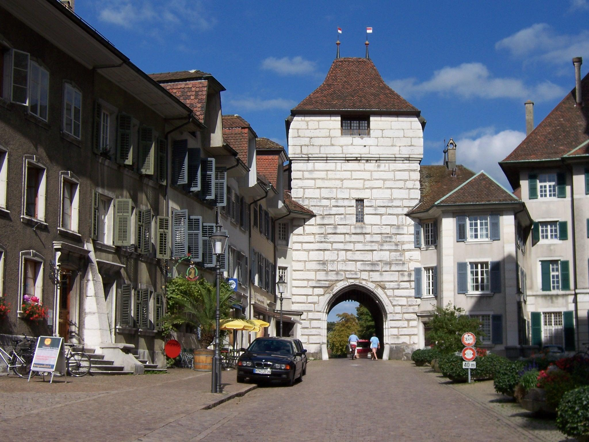 Baseltor in Solothurn (Kanton Solothurn, Schweiz)